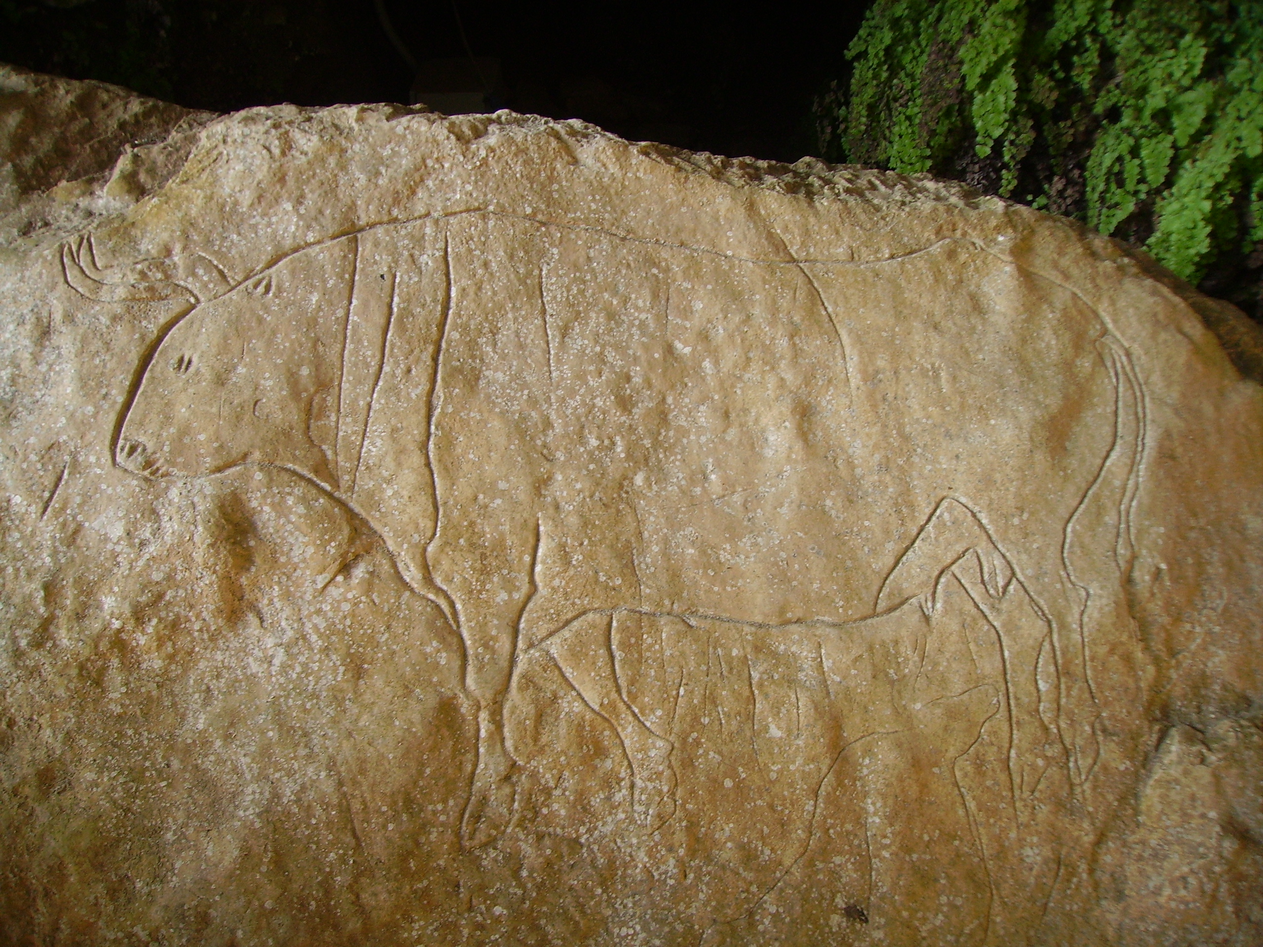 Graffito Bos Primigenius Grotta del Romito (prov. Cosenza).